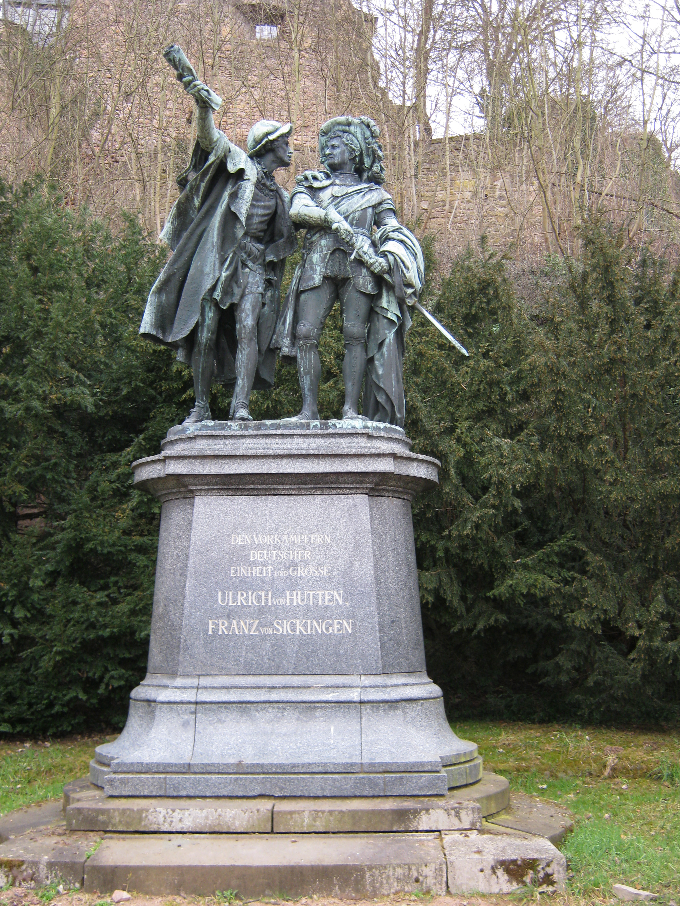 Das Hutten-Sickingen-Denkmal an der Ebernburg in Bad Kreuznach